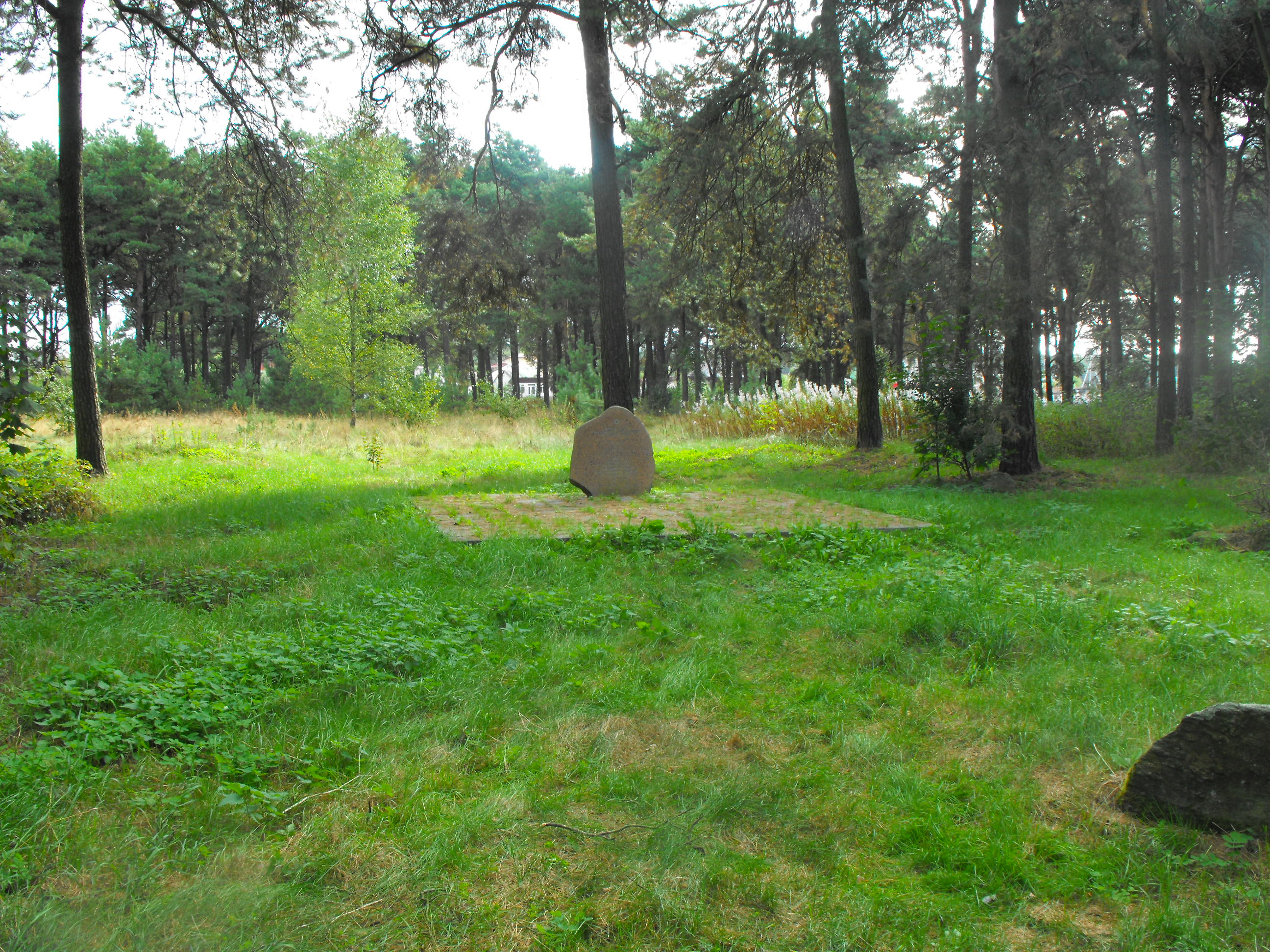 Памятник на еврейском кладбище Ракова 112 евреям Раковкого гетто с надписью: "Жертвам нацизма. Тут осенью 1941 г. зверски замучены 112 евреев деревни Раков". Вход на кладбище находится на улице Пушкина напротив дома № 2.